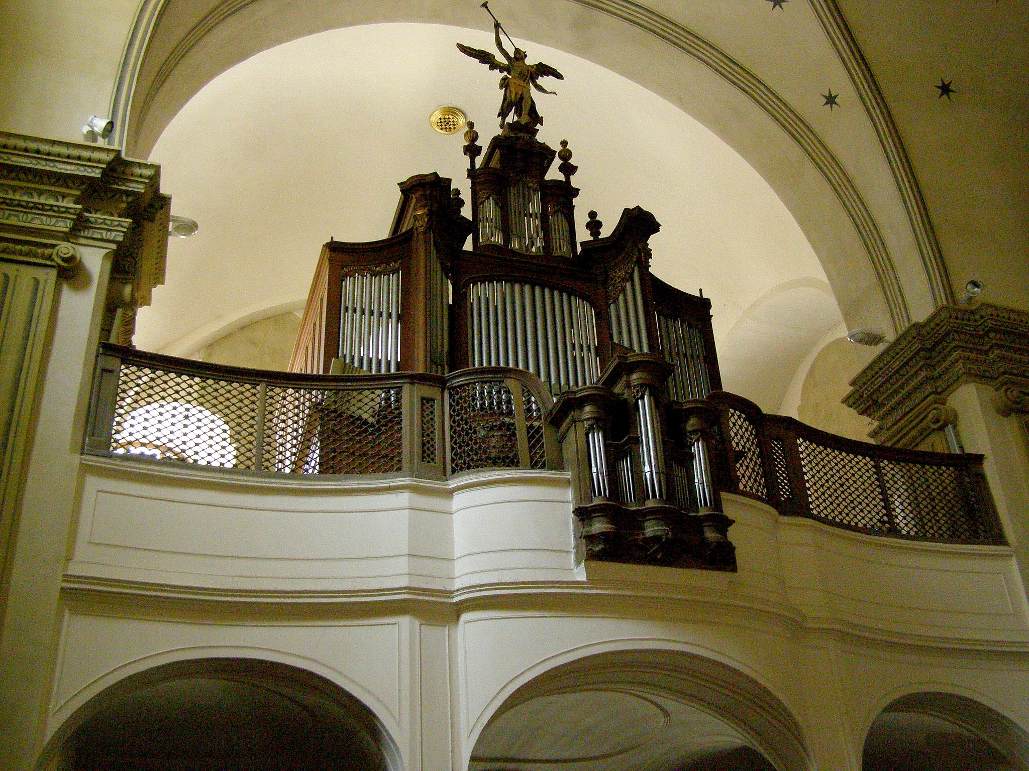 Chór s organom